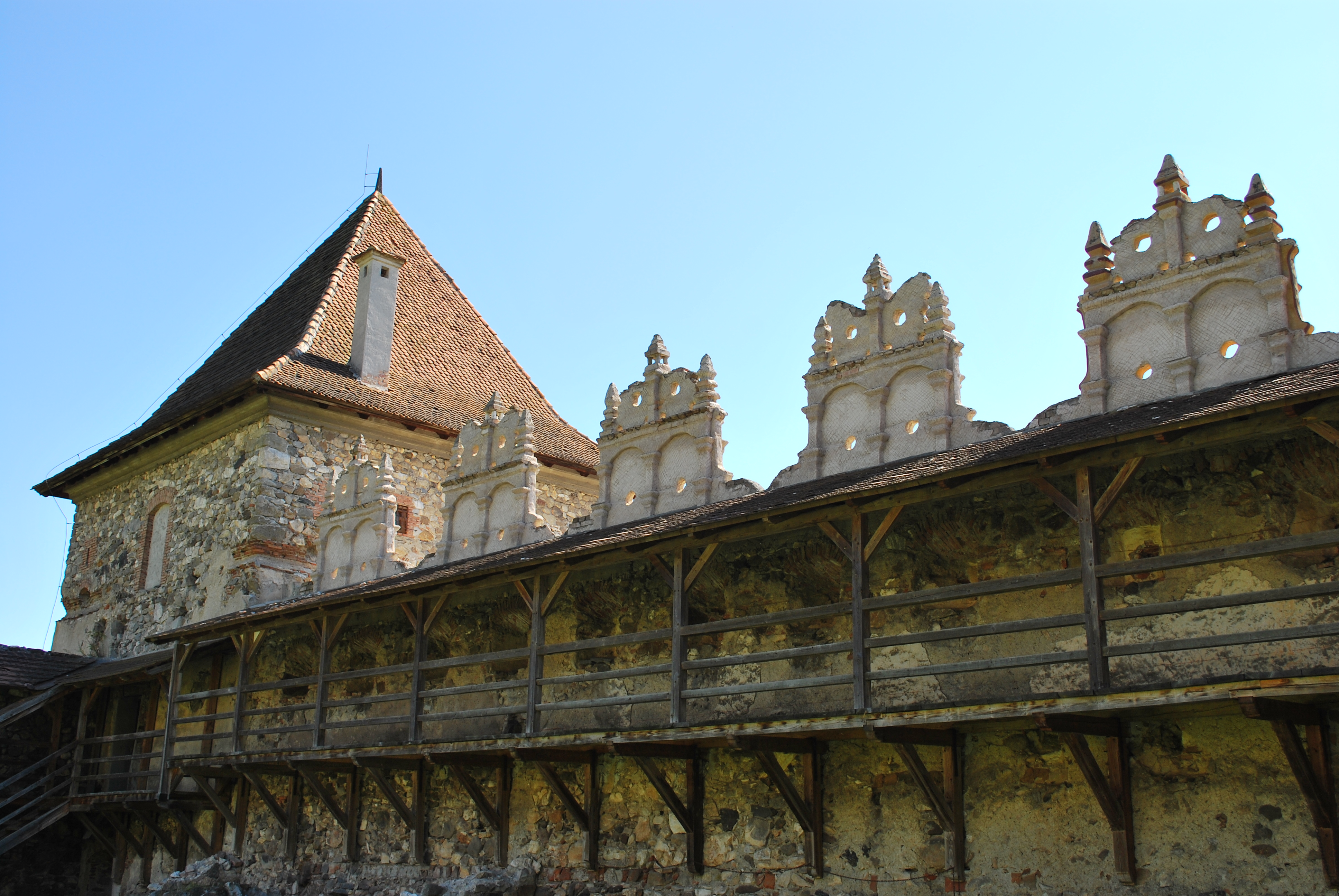 Bastion Sud Vestic 04